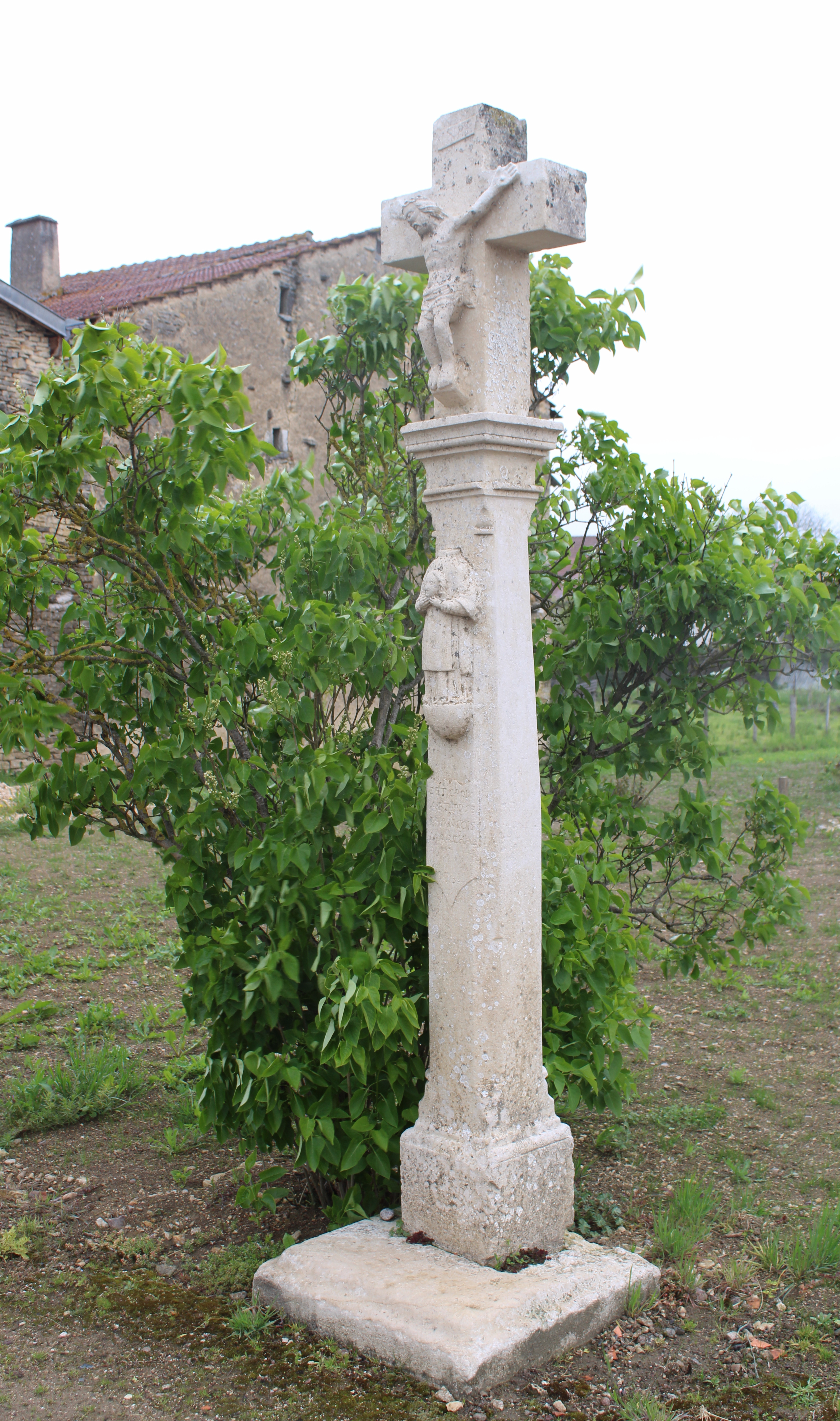 Le calvaire de Saint-Elophe à Punerot (1751)